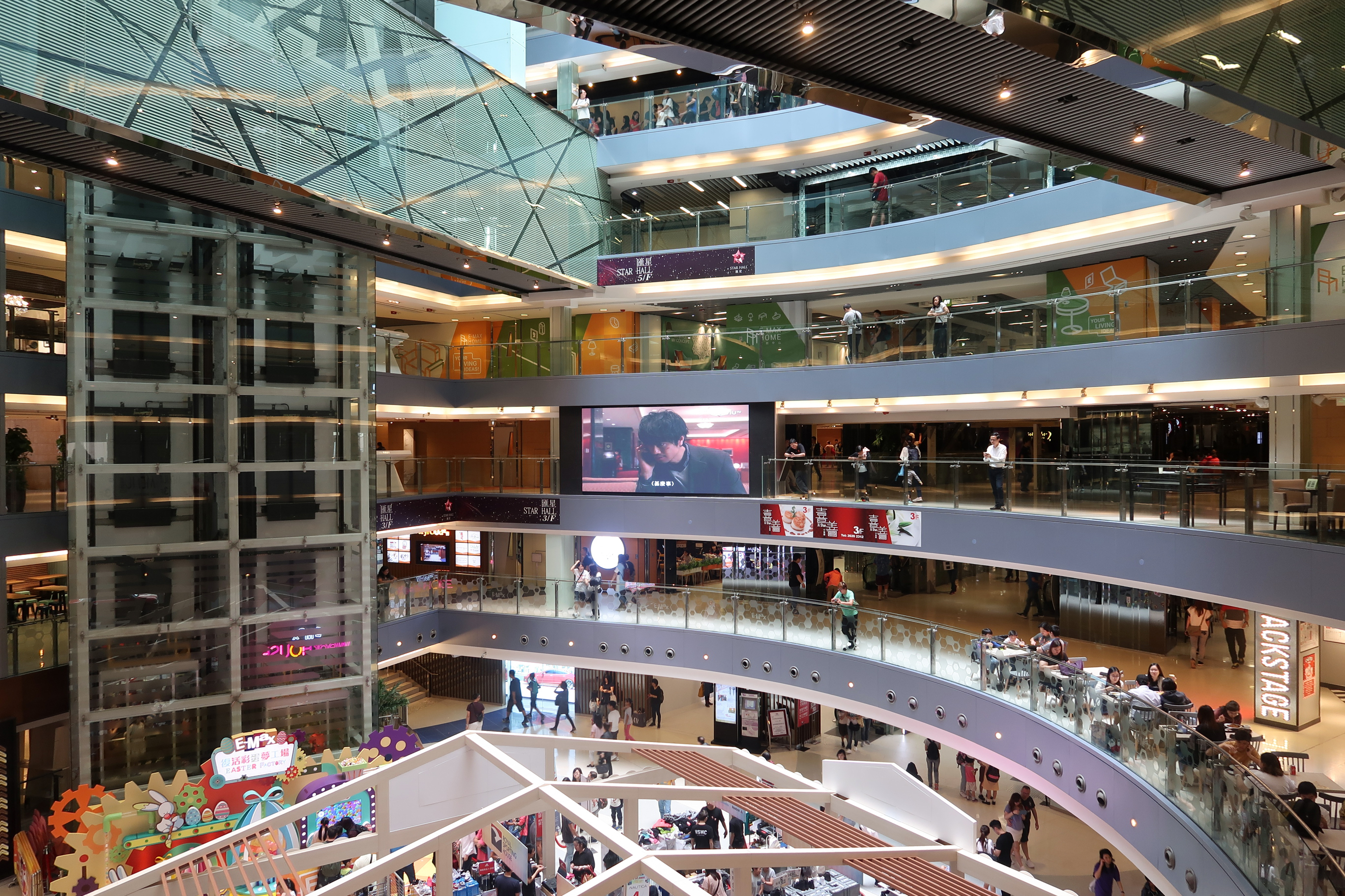 E-Max Atrium